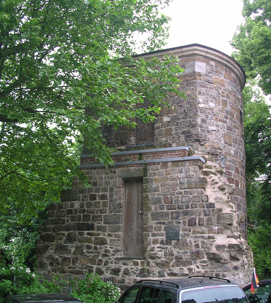 Aachen, Lavenstein aus dem 14. Jahrhundert, Teil der äußeren Stadtmauer